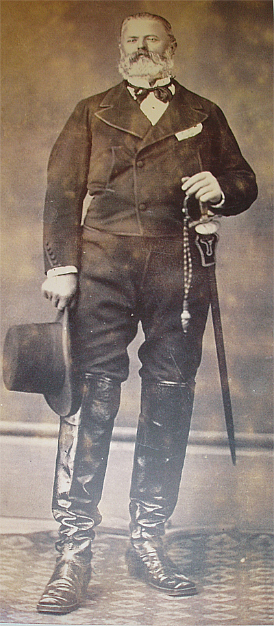 Rafael Pérez del Álamo con uniforme de oficial de los "Voluntarios de la Libertad" (hacia 1868).